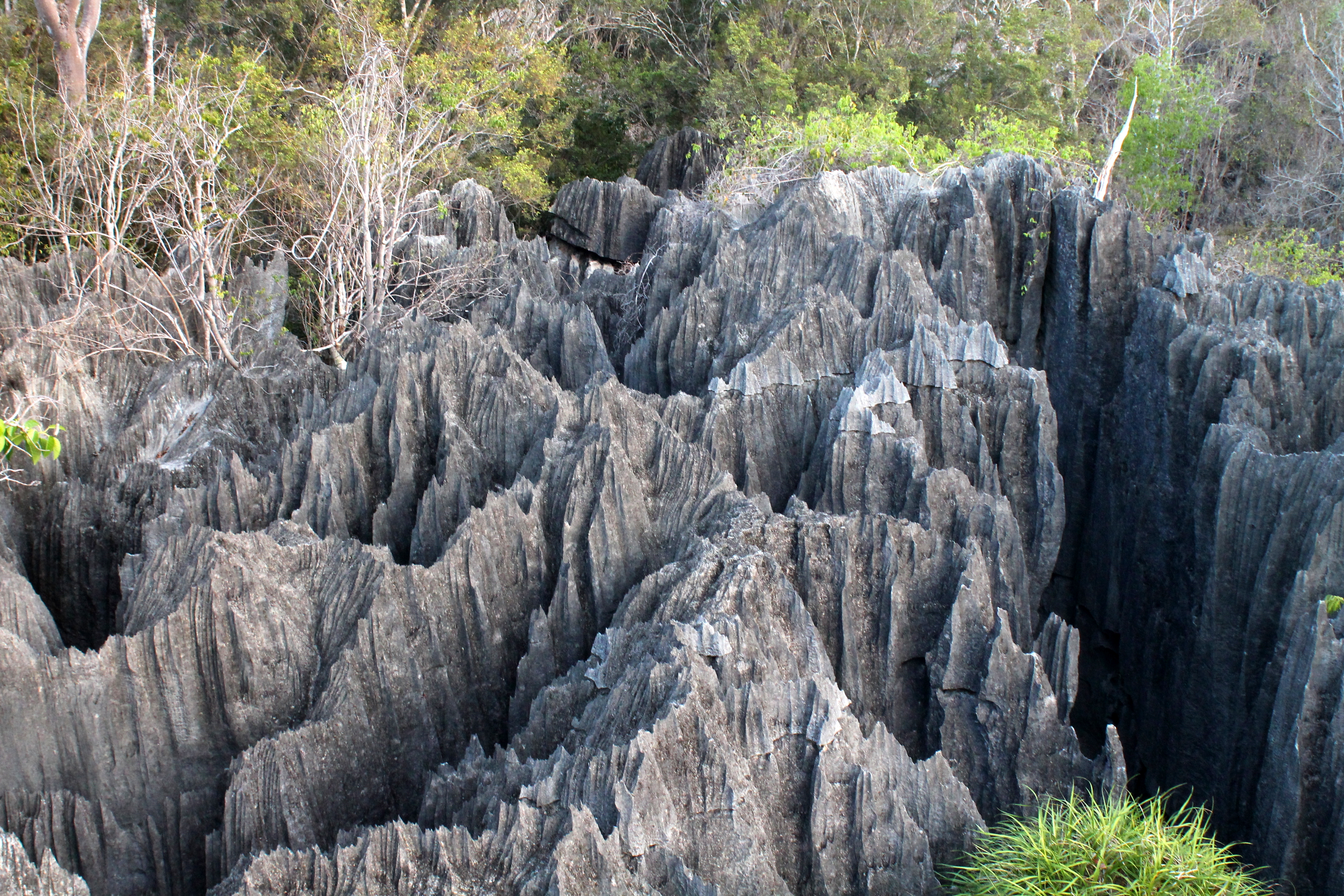 Petit Tsingy